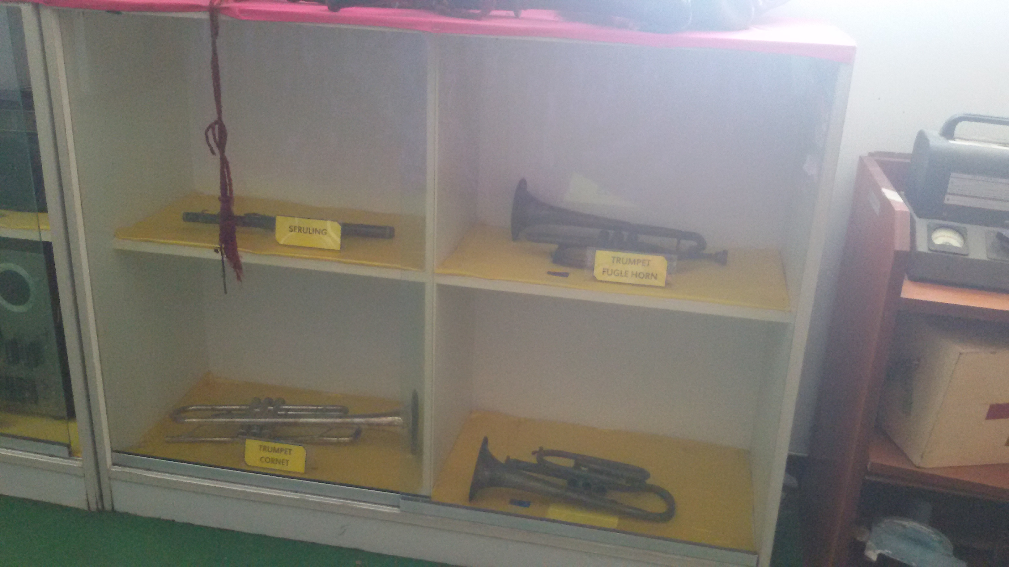 koleksi barangan yagn perlnah digunakan oleh pasukan pancaragam